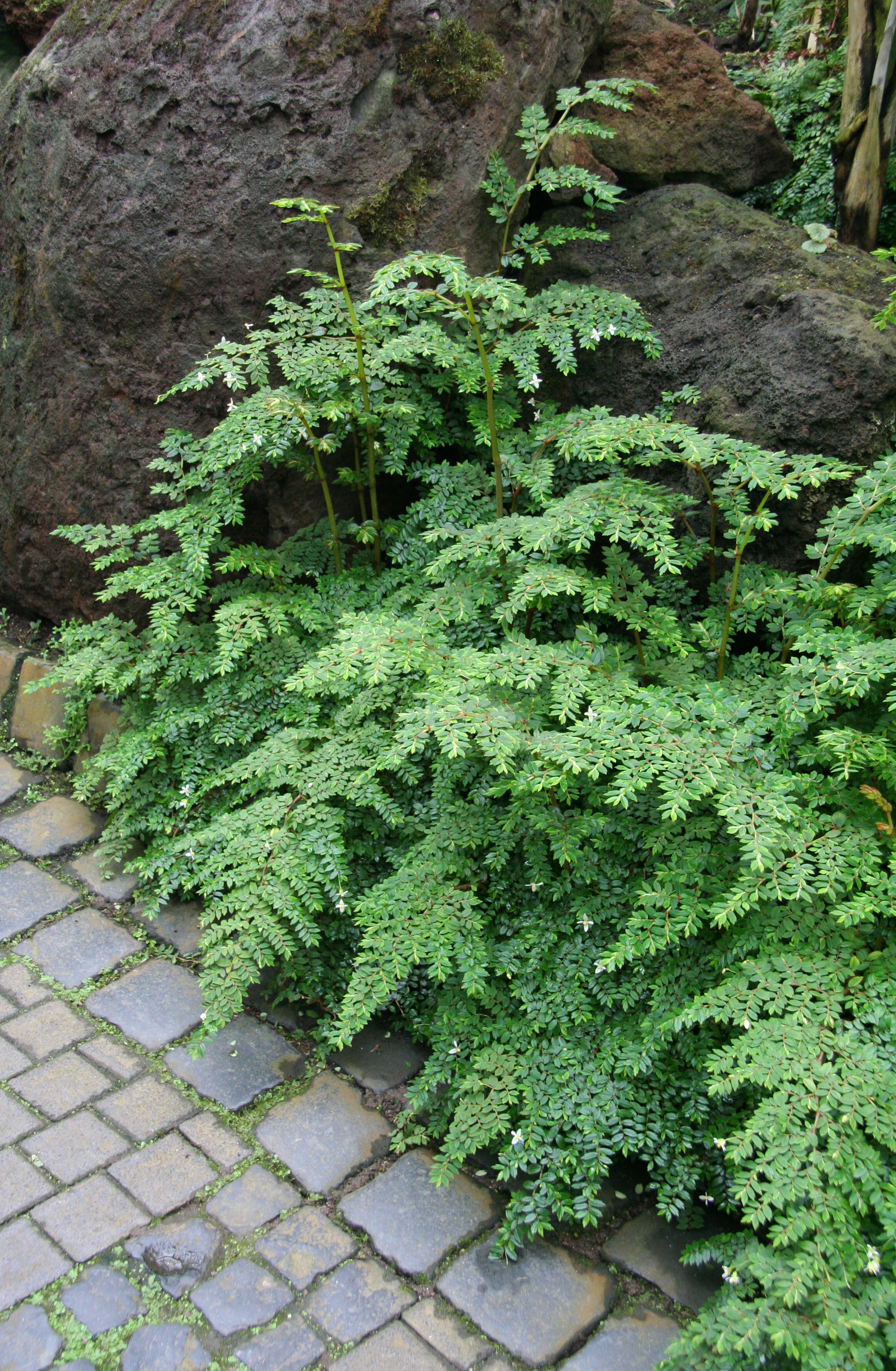 Begonia foliosa var. miniata im Palmengarten Frankfurt/Main